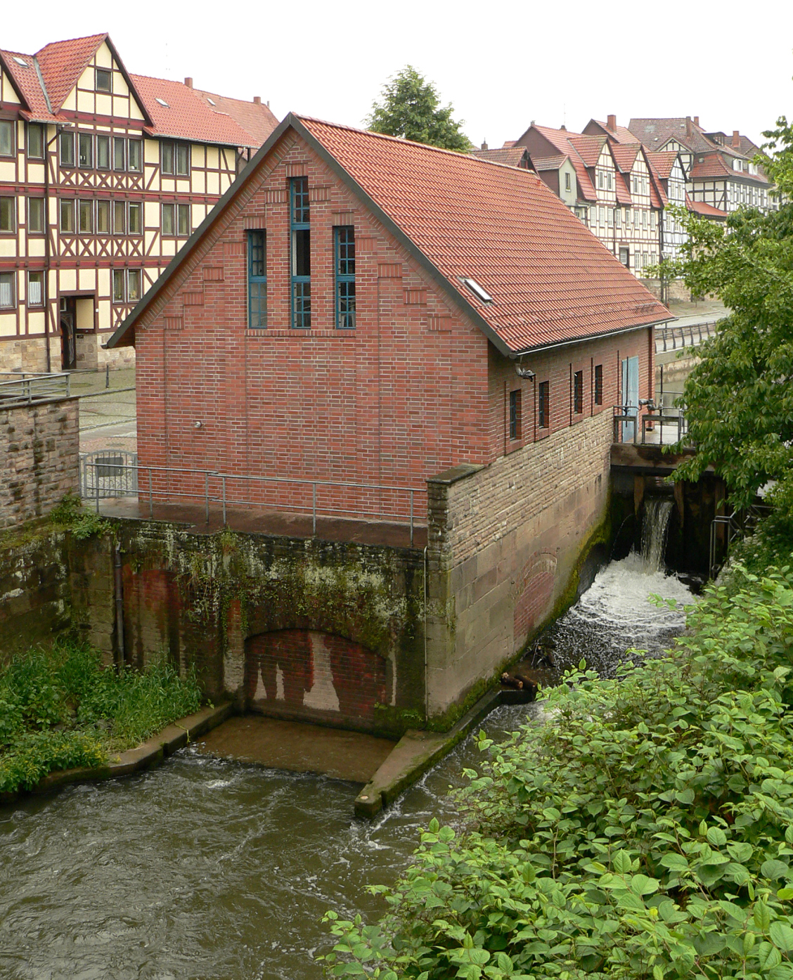 Laufwasserkraftwerk am früheren Standort und auf den Grundmauern der Graumühle